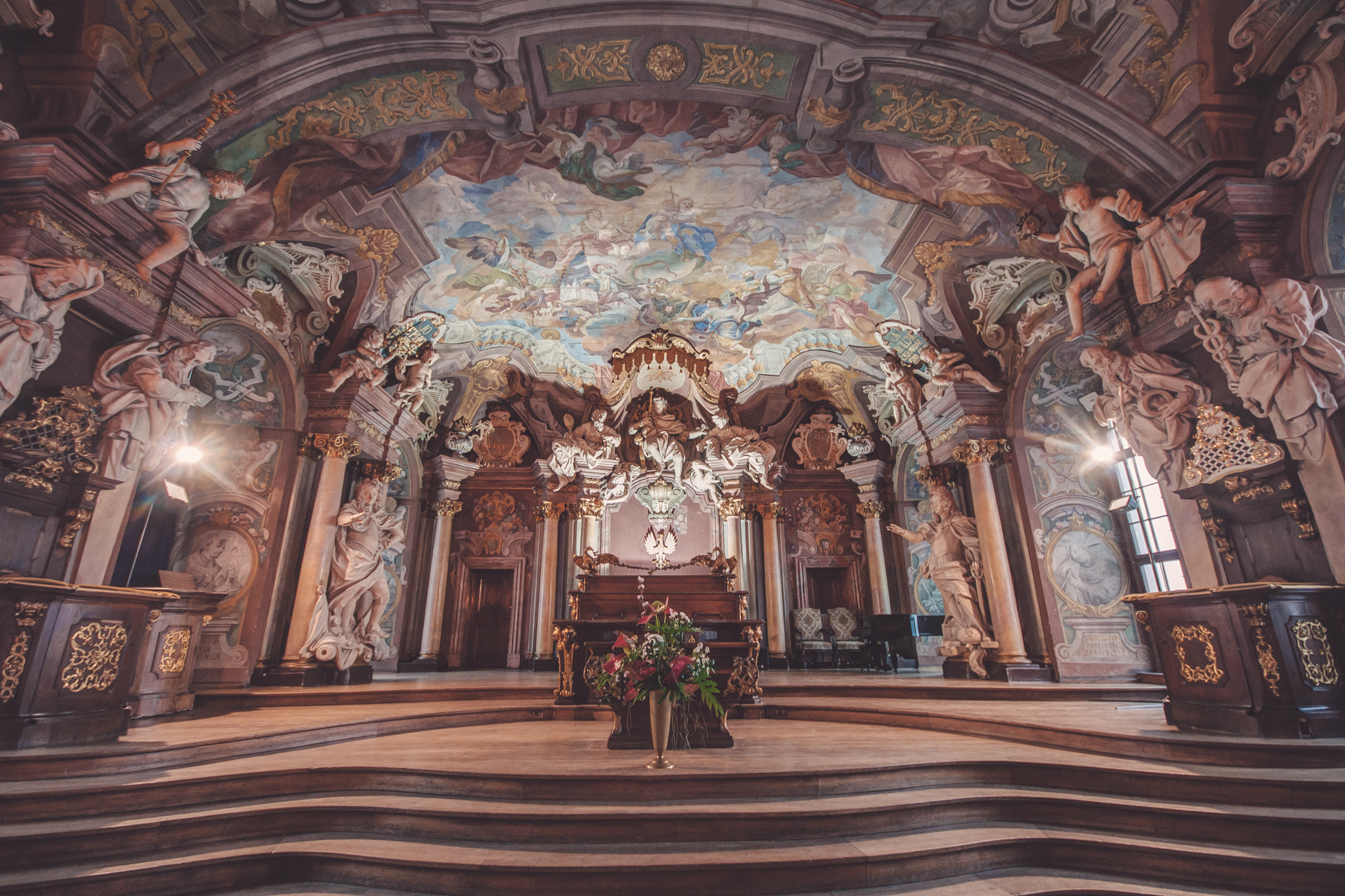 Wrocław, Aula Leopoldina Wikidata has entry Q771495 with data related to this item.